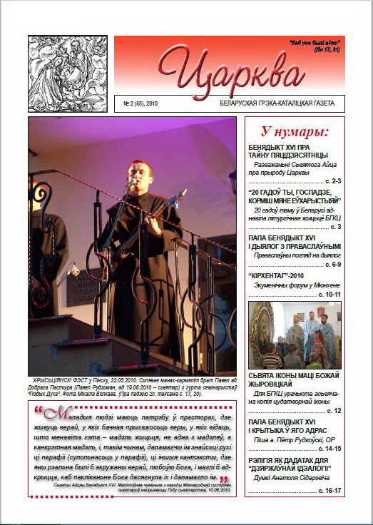 Беларуская (тарашкевіца): Нумар газэты «Царква» за 2010 год.